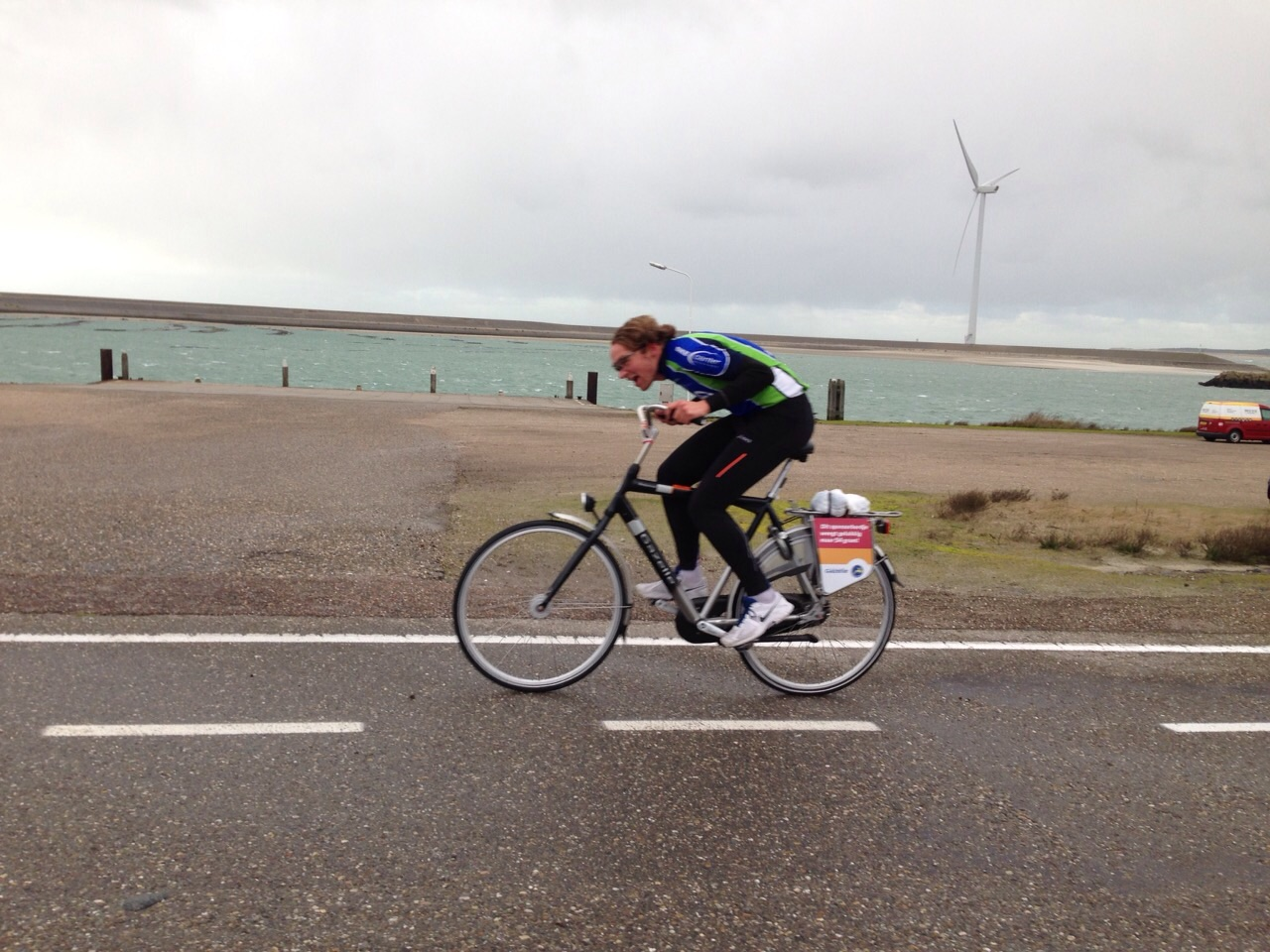 Deelnemer aan het NK Tegenwindfietsen 2014